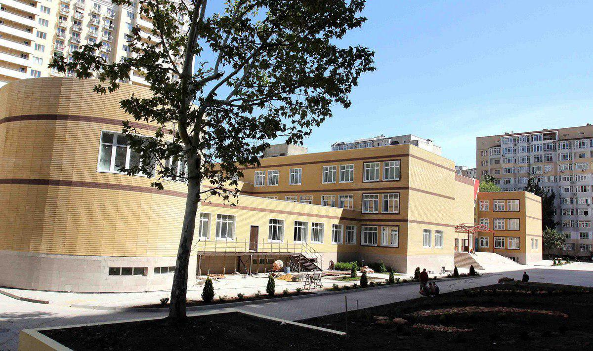 Вид на школу